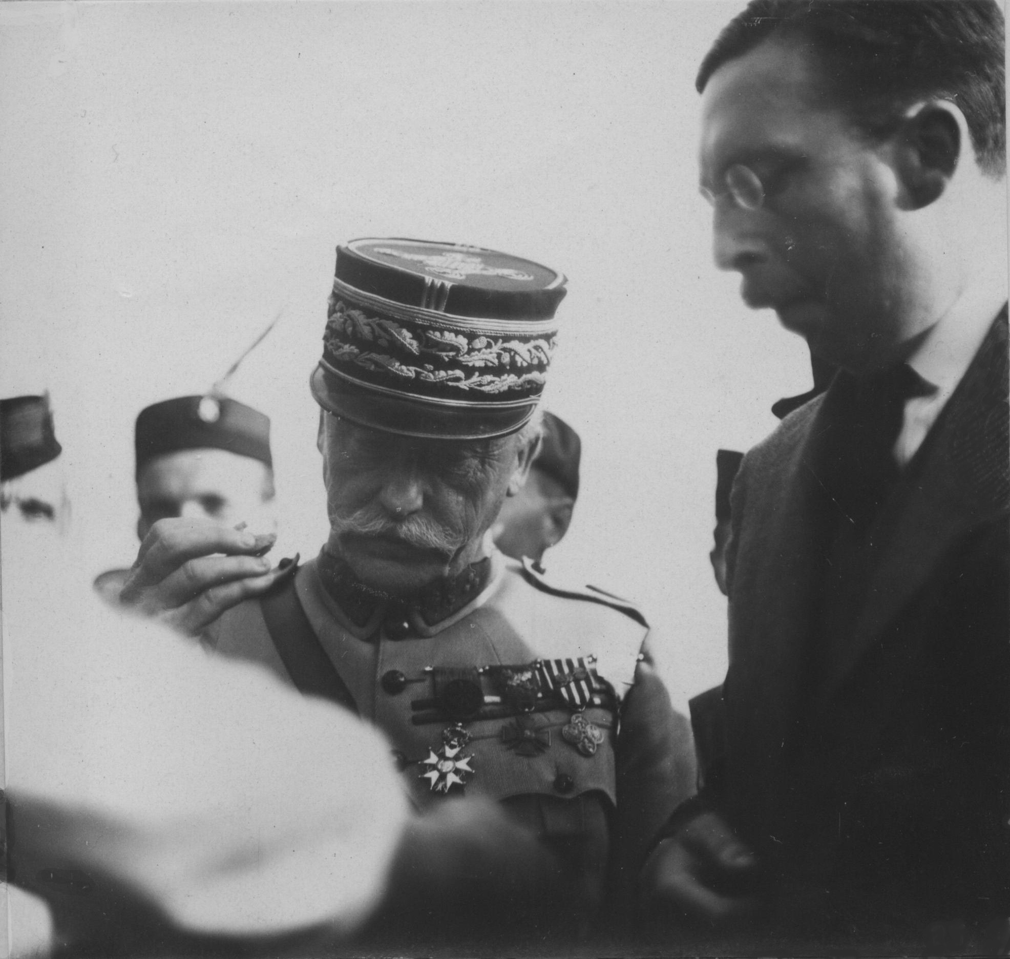 Le général français Maurice Pellé en délégation au Sokol de 1920.